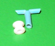 Zwei mögliche Formen von Paukenröhrchen